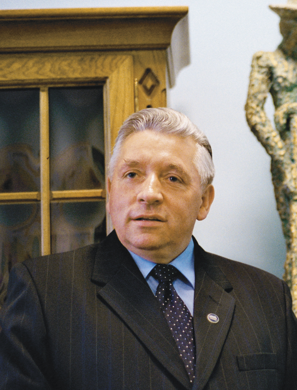 Przewodniczący Samoobrony Andrzej Lepper w swoim biurze w Al. Jerozolimskich 30 w Warszawie. Fot. Błażej Pajda